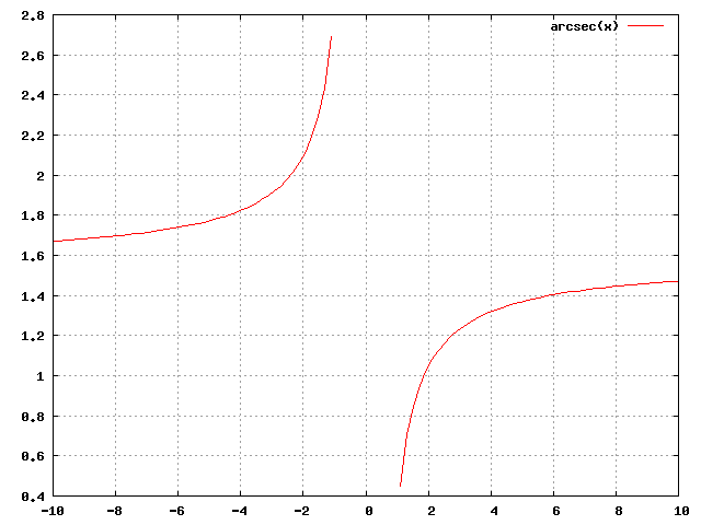 Arcosecante. Immagine creata con GNUplot.